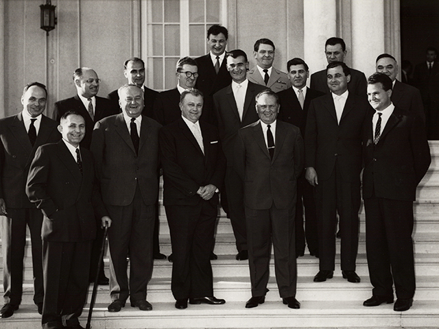 Srpski (latinica): Prijem delegacije Službe bezbednosti povodom 70. rođendana kod predsednika Tita: grupna fotografija, Beograd Inventarski broj:1962 194 038